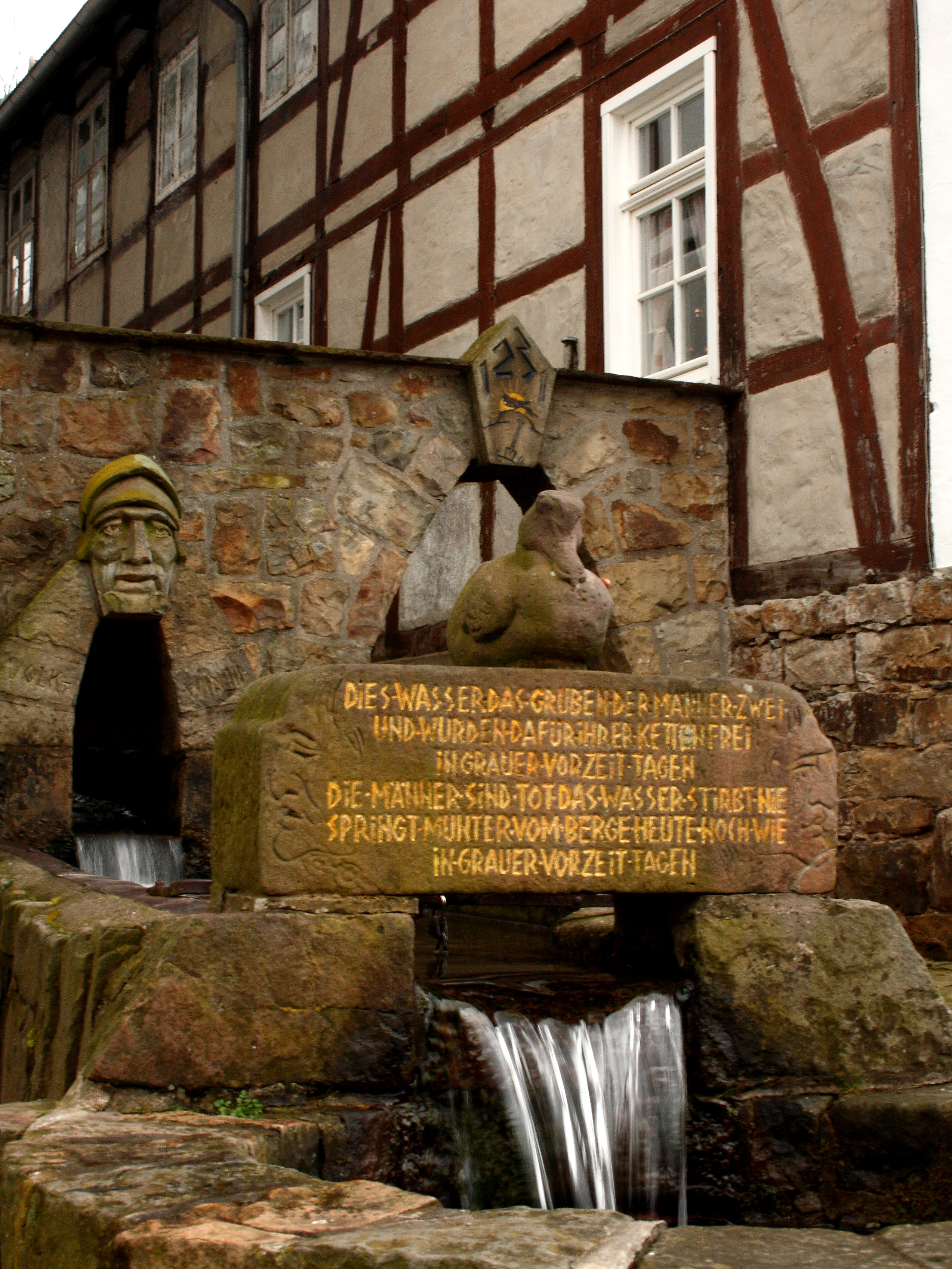 Brunnen in Schieder-Schwalenberg, Nordrhein-Westfalen, Deutschland